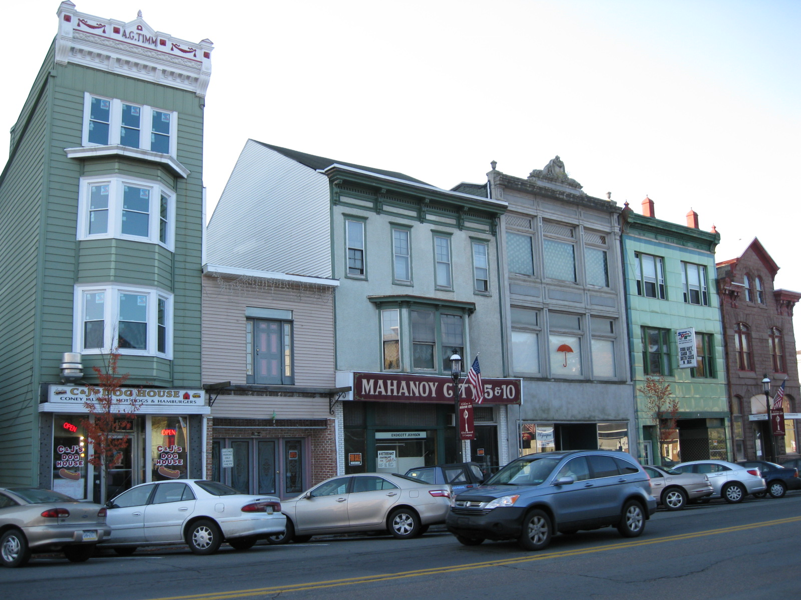 Mahanoy City, Pennsylvania